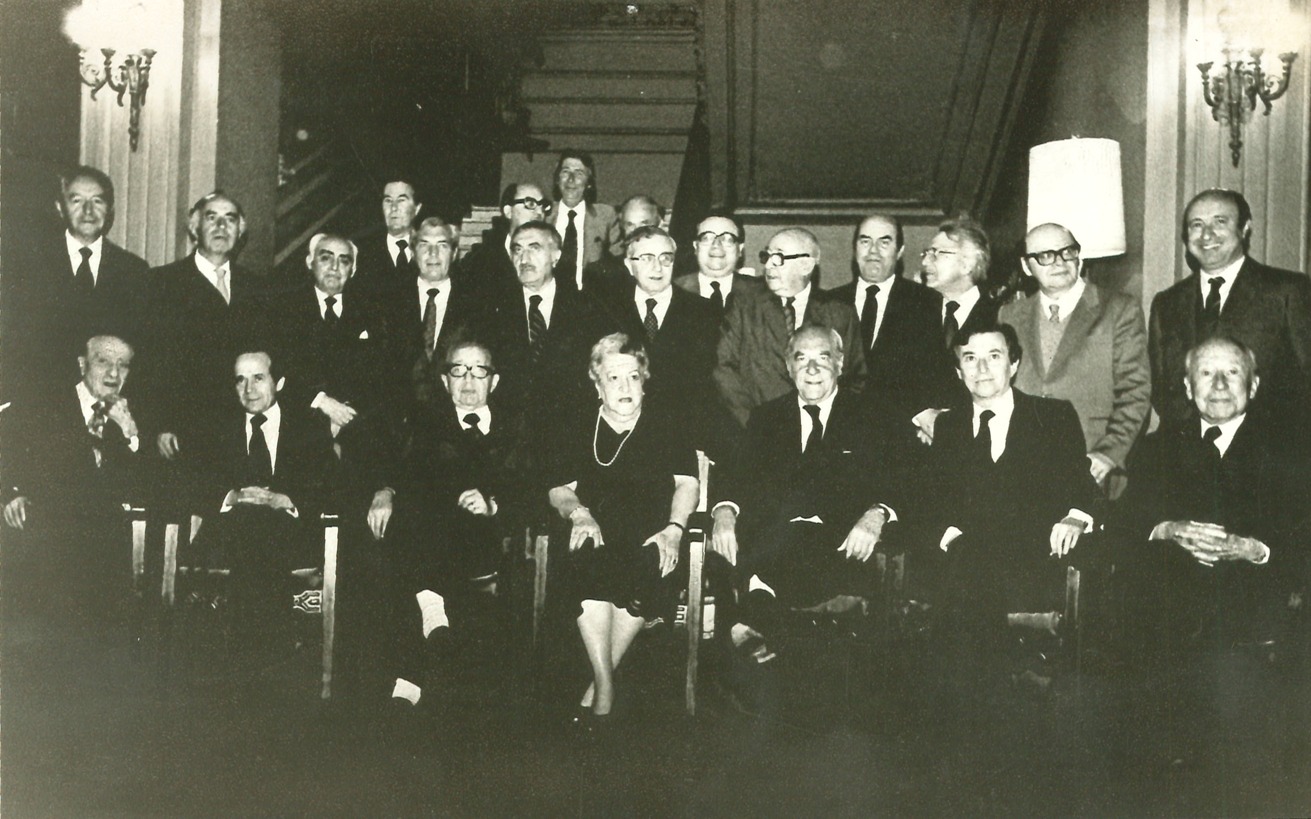 Reunión de ex colaboradores y ex ministros del Presidente Eduardo Frei Montalva junto a su esposa María Ruiz-Tagle Jiménez. La acompañan Carlos Figueroa, Raúl Sáez, Alejandro Hales, Enrique Krauss, Patricio Rojas, Jaime Castillo, Andrés Zaldívar, Bernardo Leighton, Gabriel Valdés y Juan Hamilton. 1990